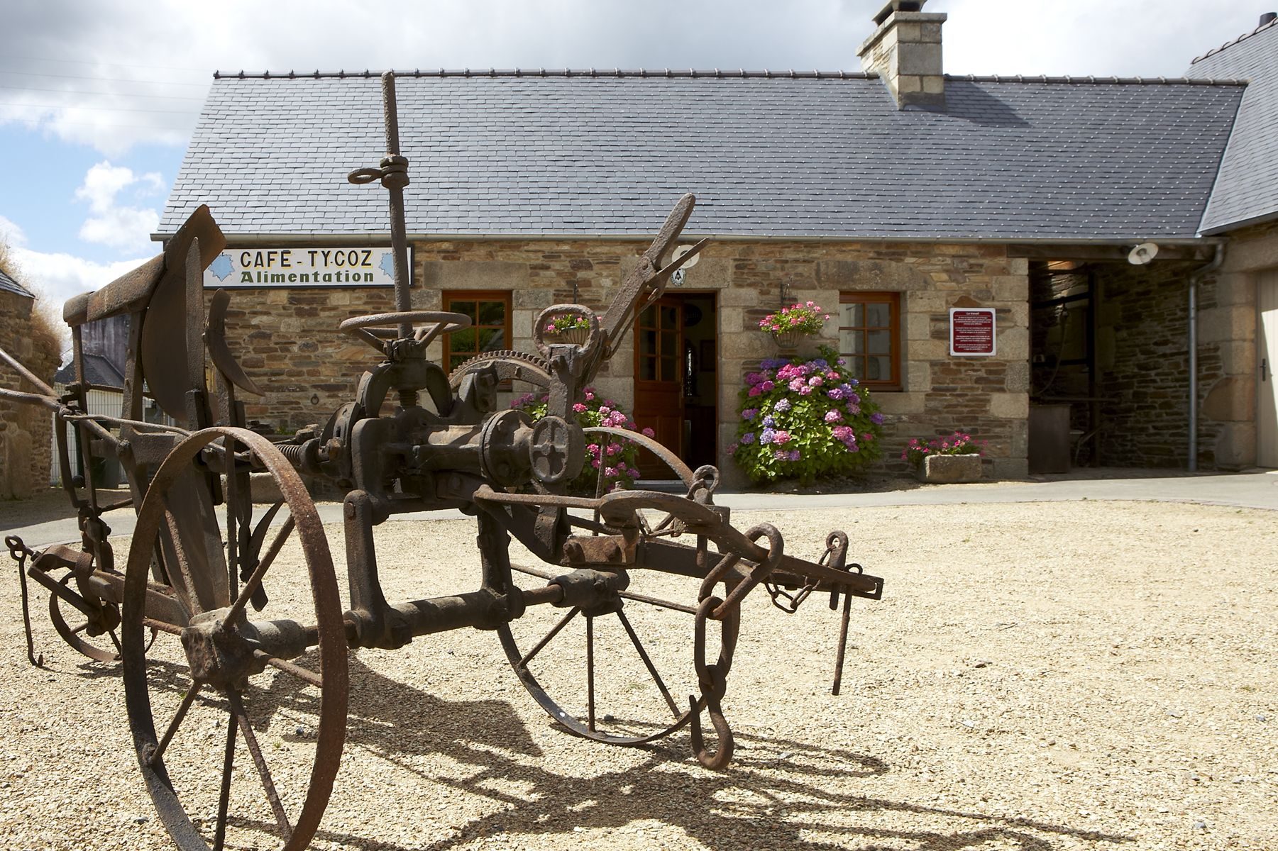 une vue de l'Ecomusée